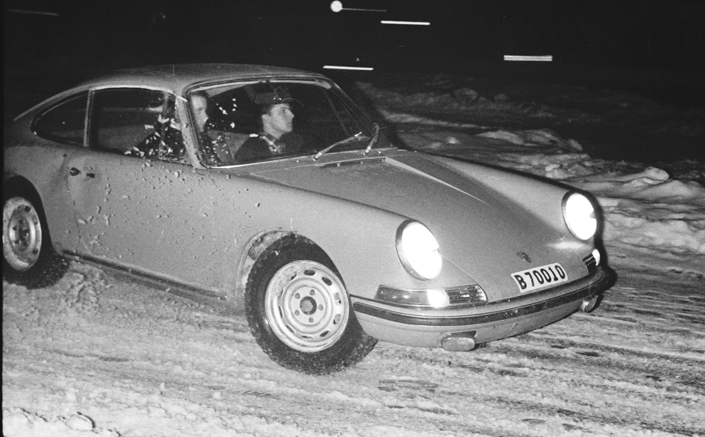 Åke "Bryggarn" Andersson kör isbana i "Pattons Hage", Vårdsätra utanför Uppsala. Inofficiell tävling med publik.